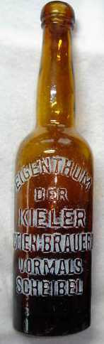 Flasche mit Aufschrift Eigenthum der Kieler Actien-Brauerei vormals Scheibel